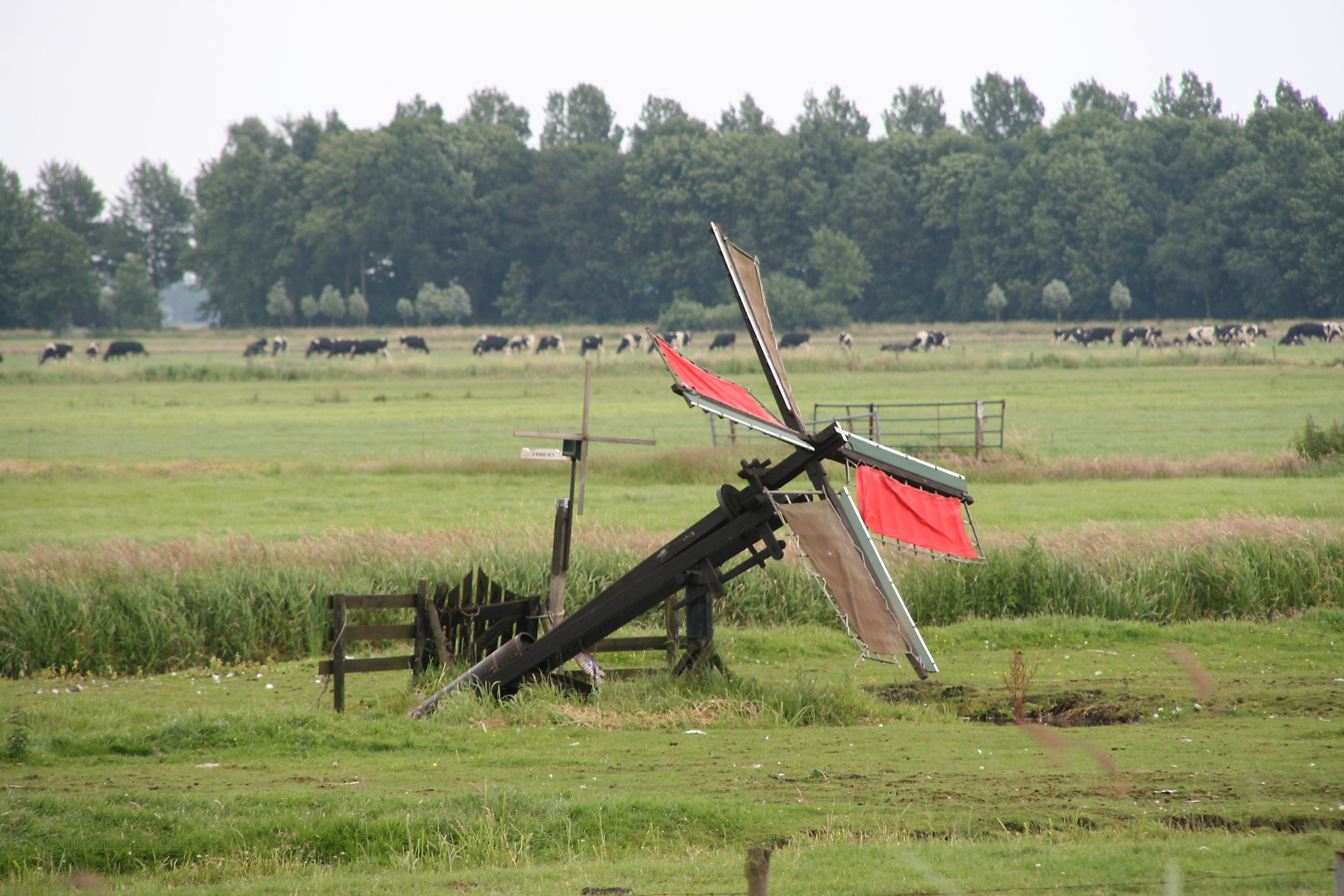 Bleskensgraaf: paaltjasker